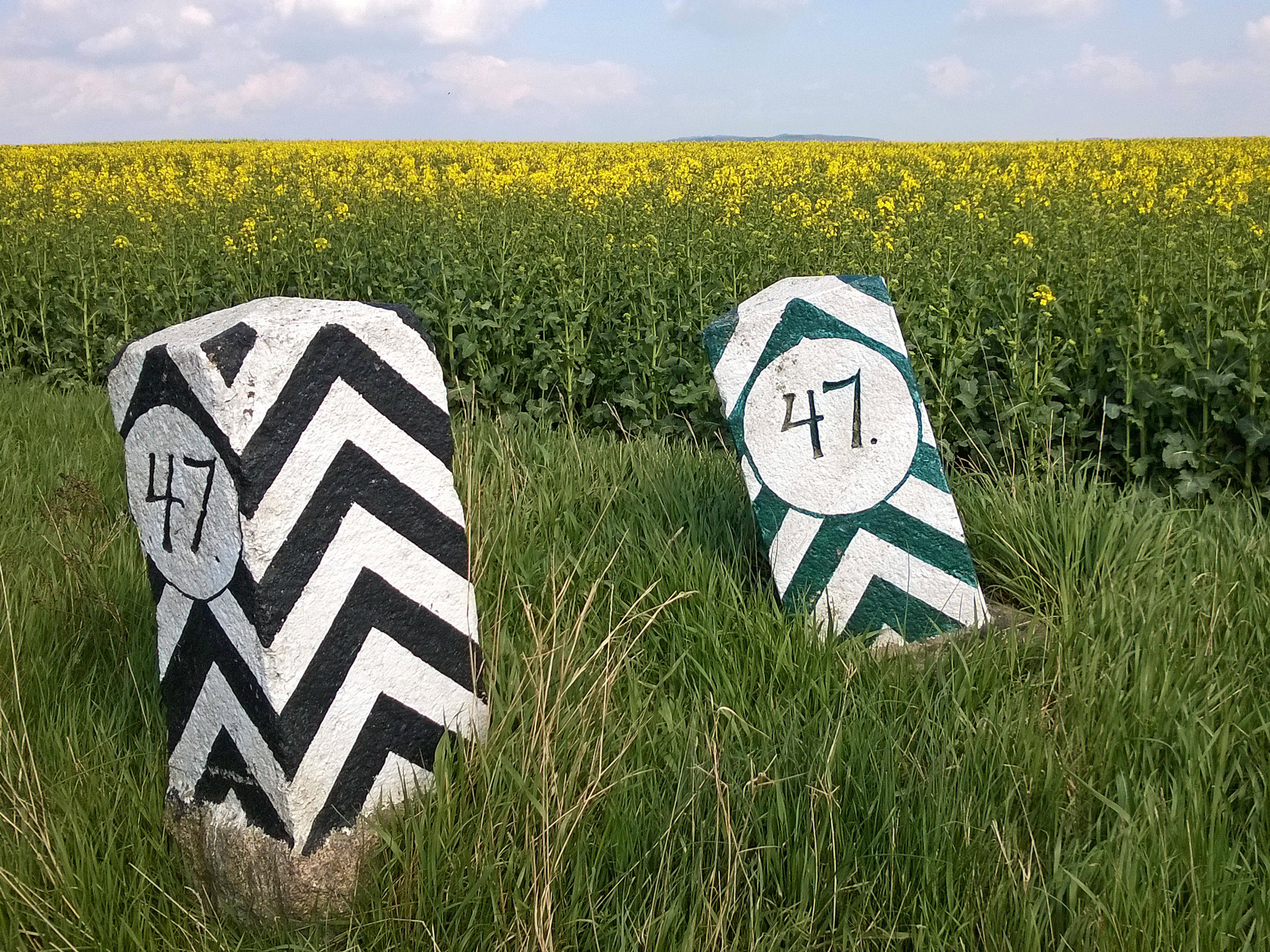 Grenzstein Nr. 47 Historische Landesgrenze Königreich Sachsen Königreich Preußen 1815 (Wiener Kongress)